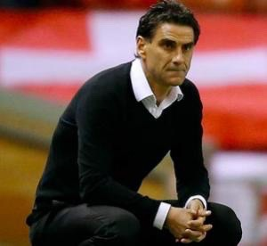 Photo de l'entraîneur Didier Tholot agenouillé sur le bord du terrain durant un match.